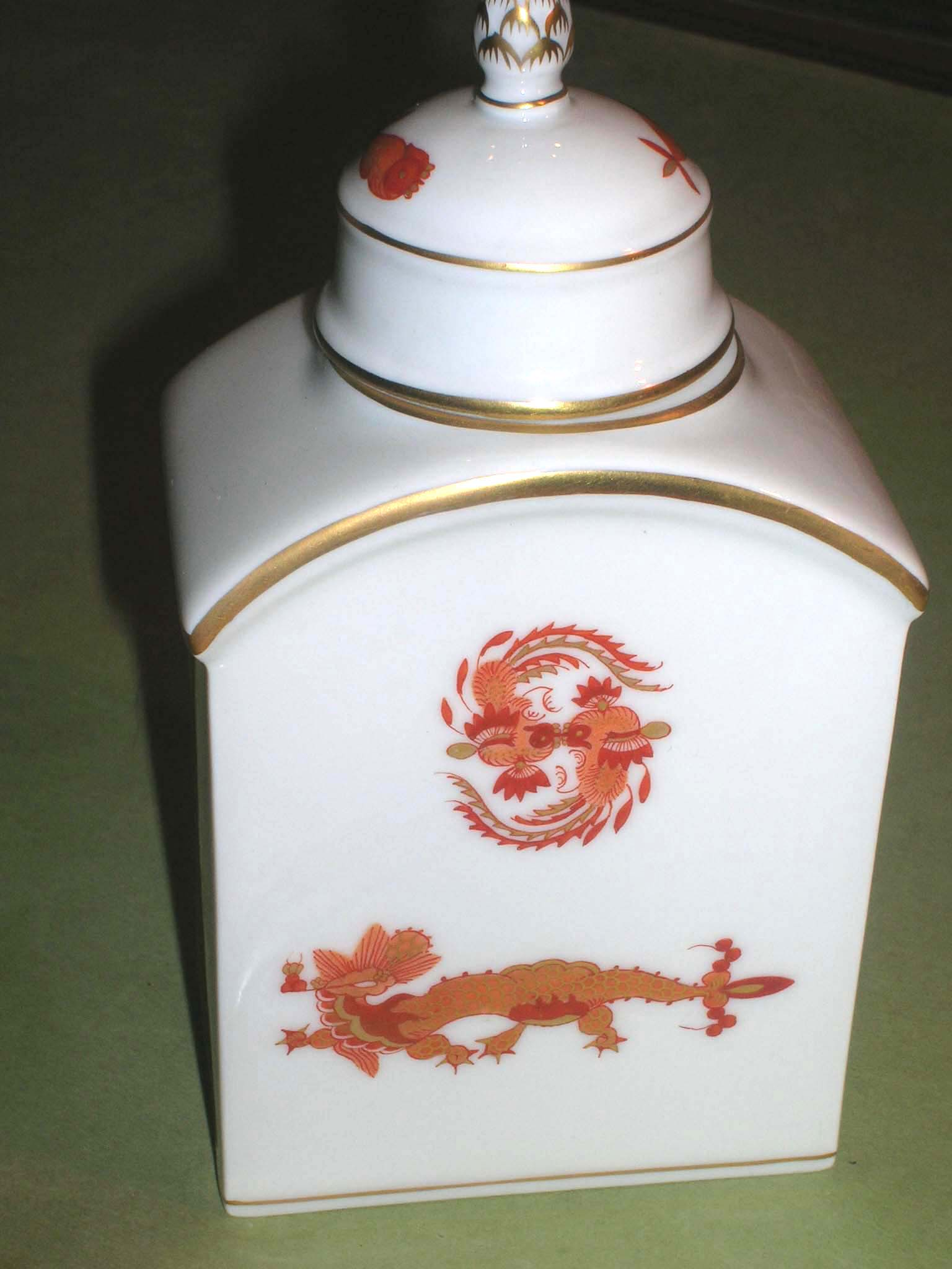 Teedose aus Meißner Porzellan, Form "Neuer Ausschnitt", Dekor "Reicher Drache, rot", goldschattiert, Goldrand, H 14 cm